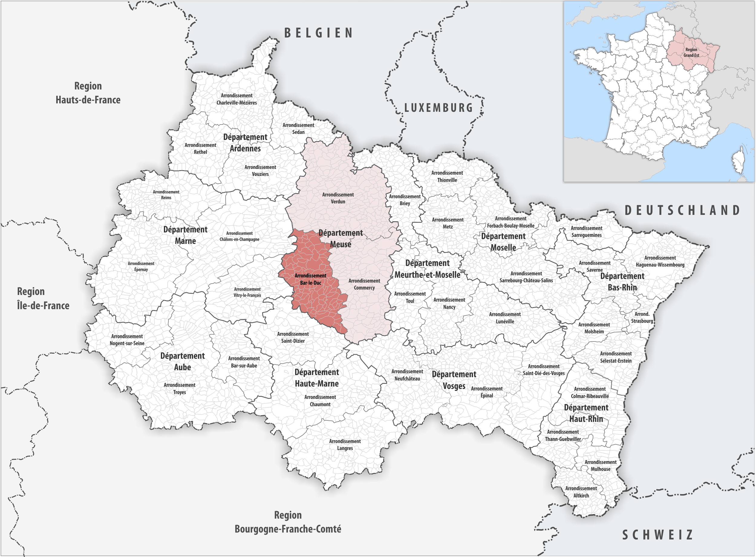 Lage des Arrondissements Bar-le-Duc